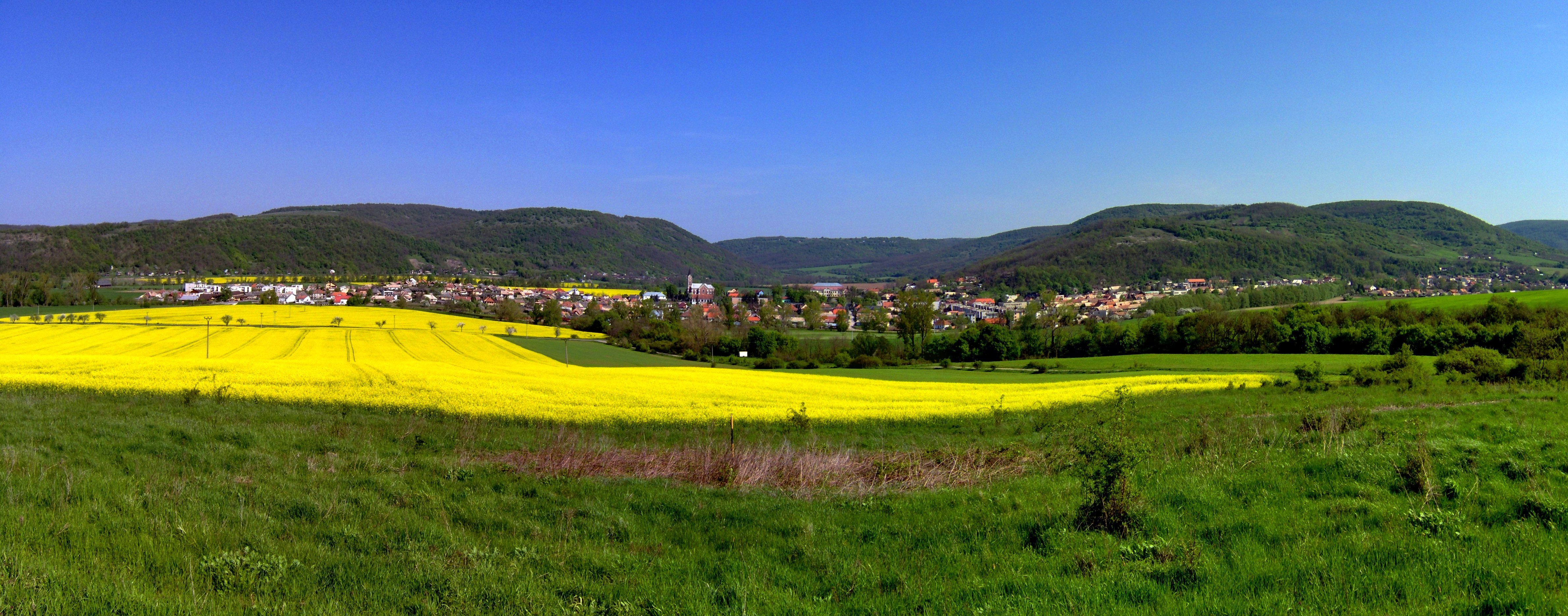 Palást, panoráma, 2013.3.25.